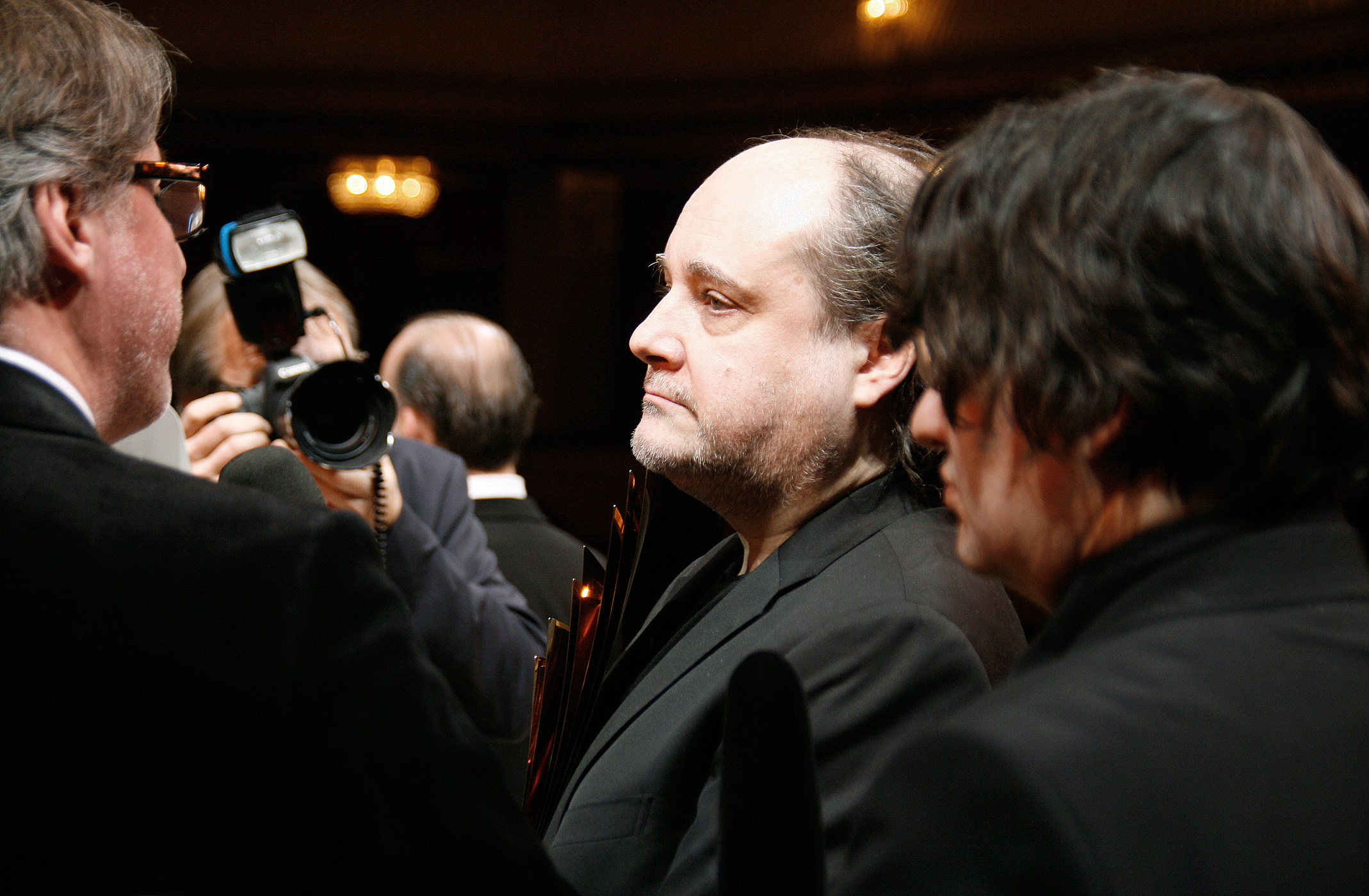 Paulus Manker, ausgezeichnet mit dem Publikumspreis, bei der Verleihung des Nestroy-Theaterpreises 2010 im Burgtheater in Wien.